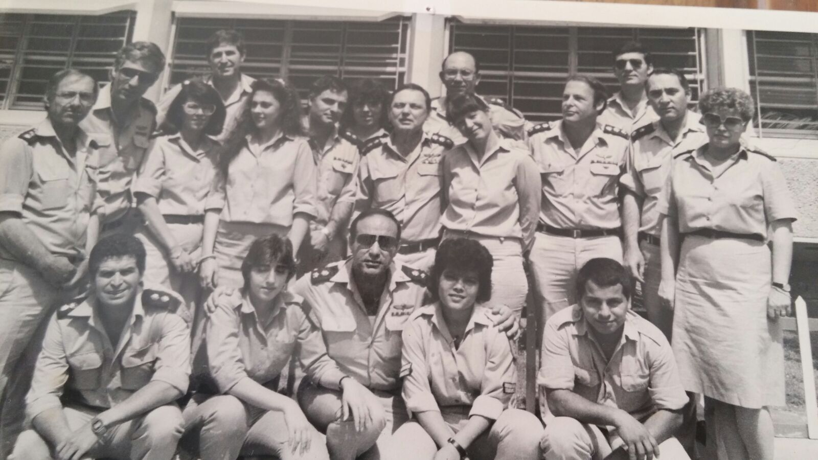 סגל מספן המודיעין בראשותו של אריה רונה, 1986.